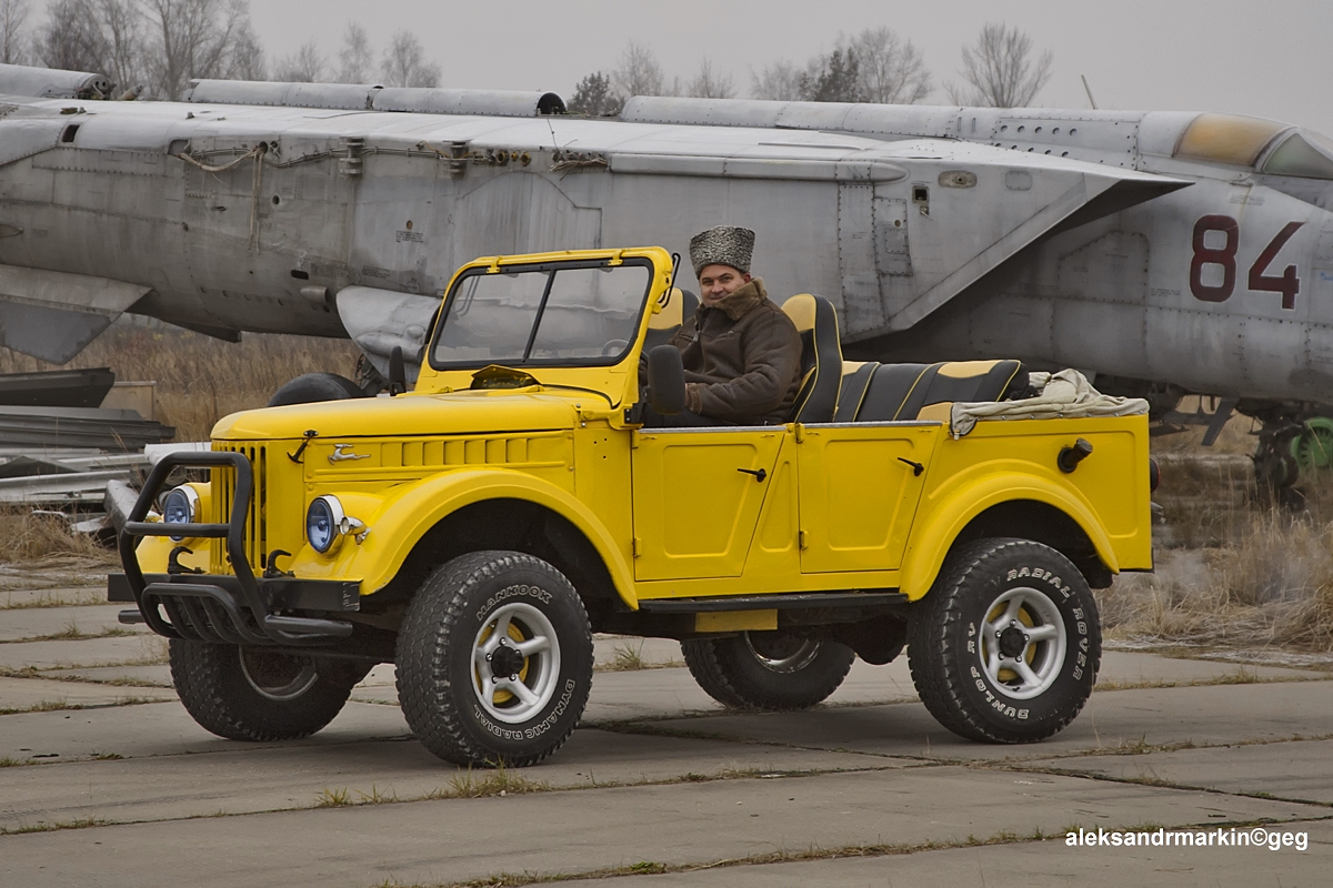 Gaz-69